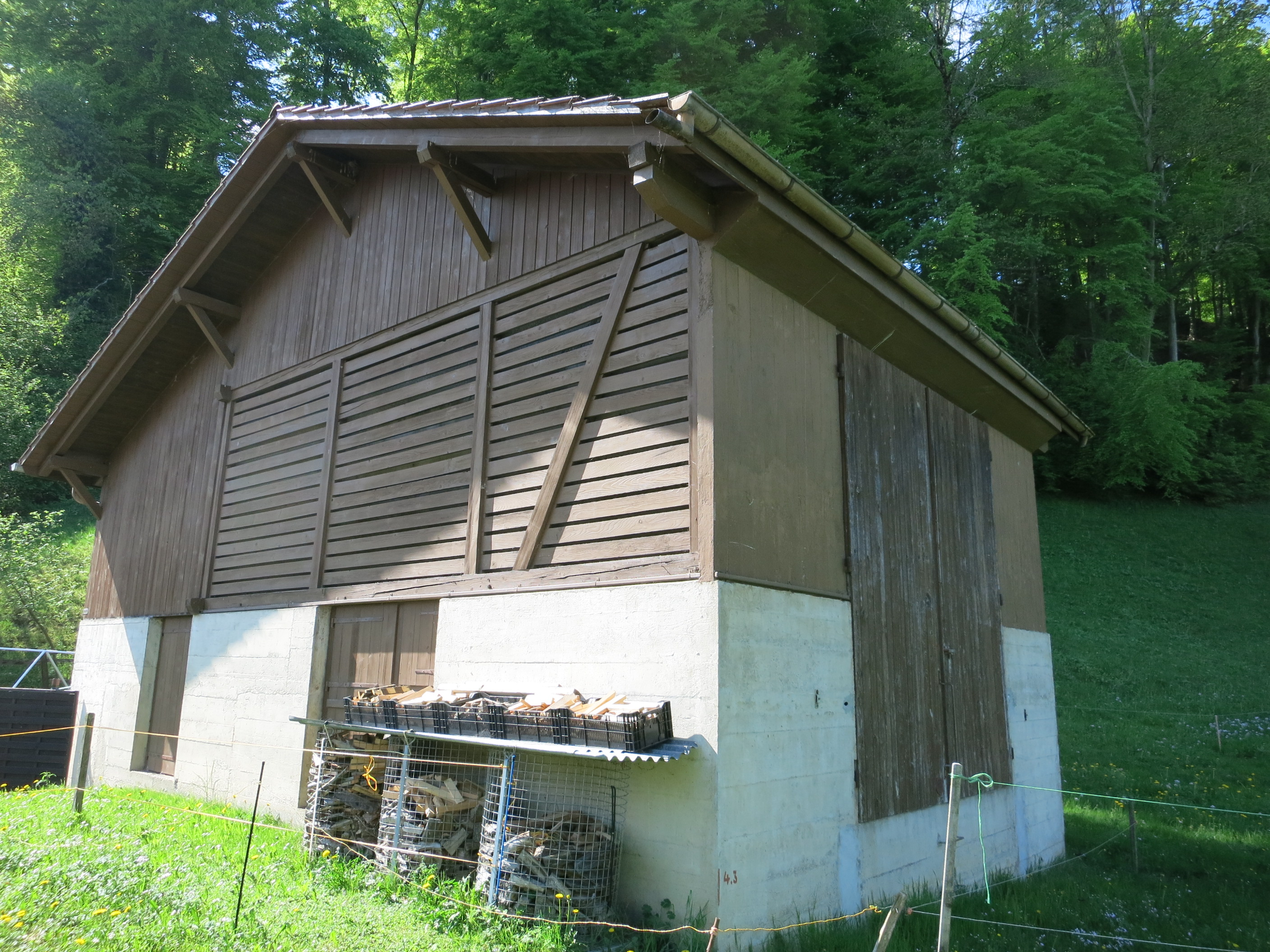 Artilleriewerk Krattigen BE, Schweiz